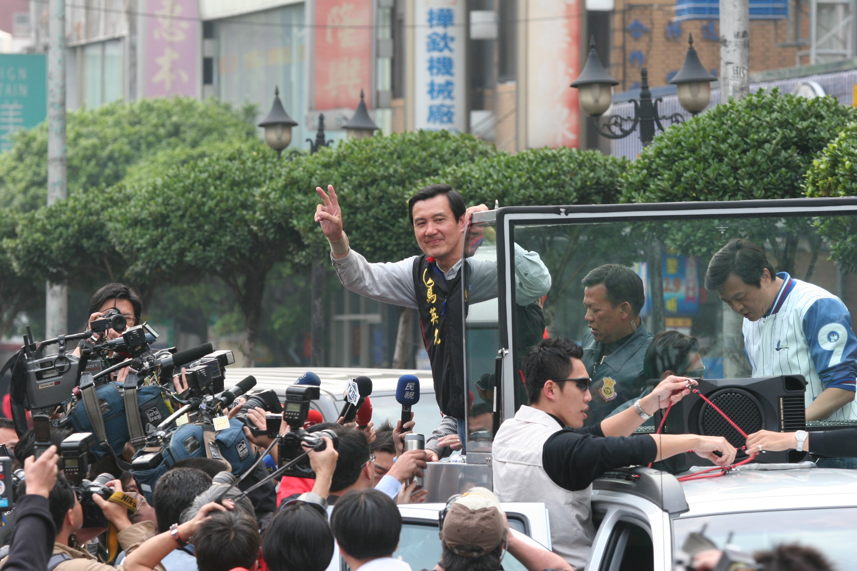 IMG 0927 080321 - 馬英九